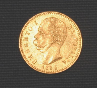 Umberto von Italien / Umberto I re d'Italia, su una moneta del 1883.